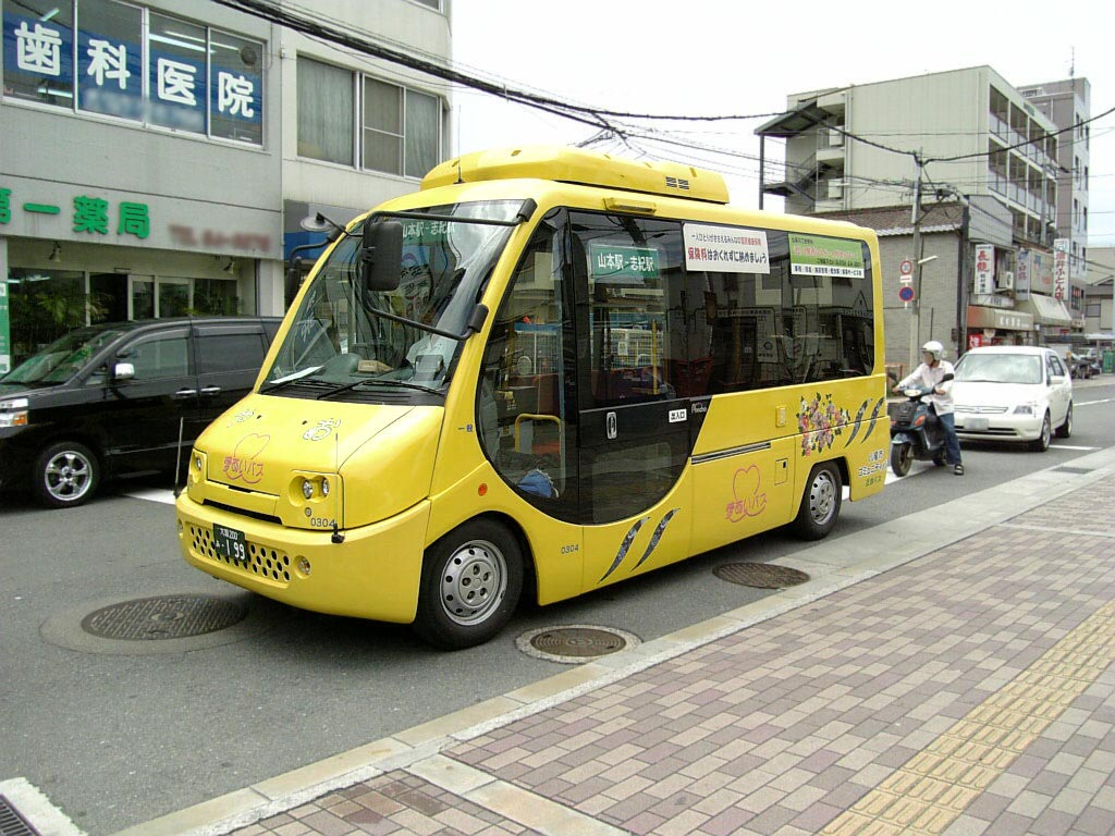 八尾市「愛あいバス」 撮影後レタッチ